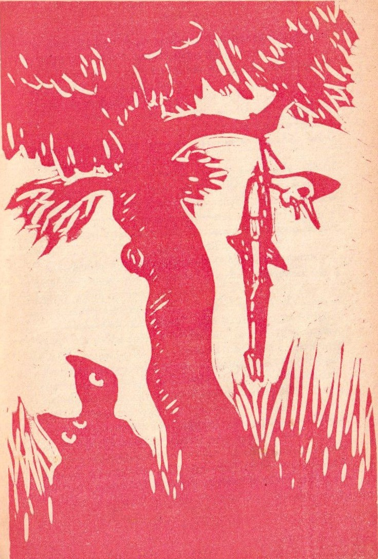 Benito Albi Bachini. Illustrazione per l'edizione del 1944 (Libreria editrice Paci "La Tifernate" - G. Paci editore). Pinocchio impiccato alla quercia grande.